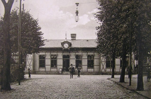 Gdańsk Nowy Port. Nieistniejące zabudowania dworca kolejowego.